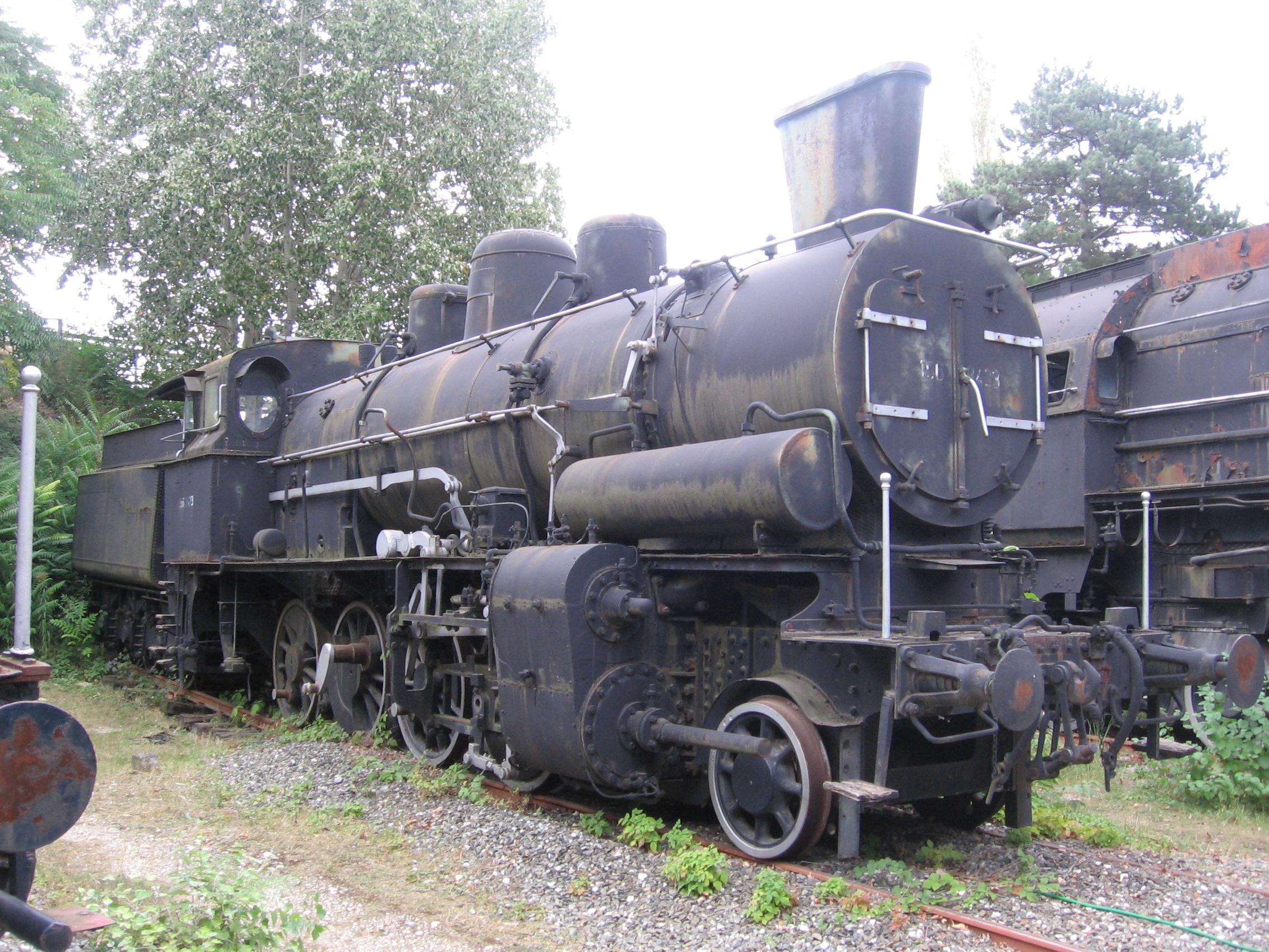 270.125 BBÖ - Floridsdorf 2617/1920, nyní 156.3423 v železničním muzeu ve Strasshofu.